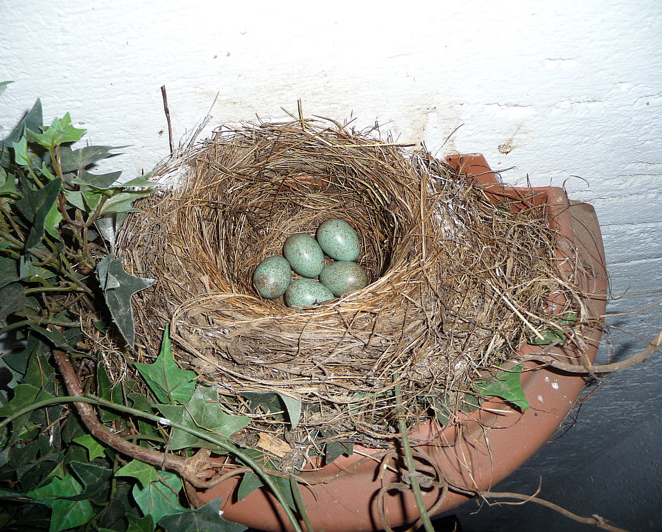 Amselgelege in einem Blumentopf an der Wand